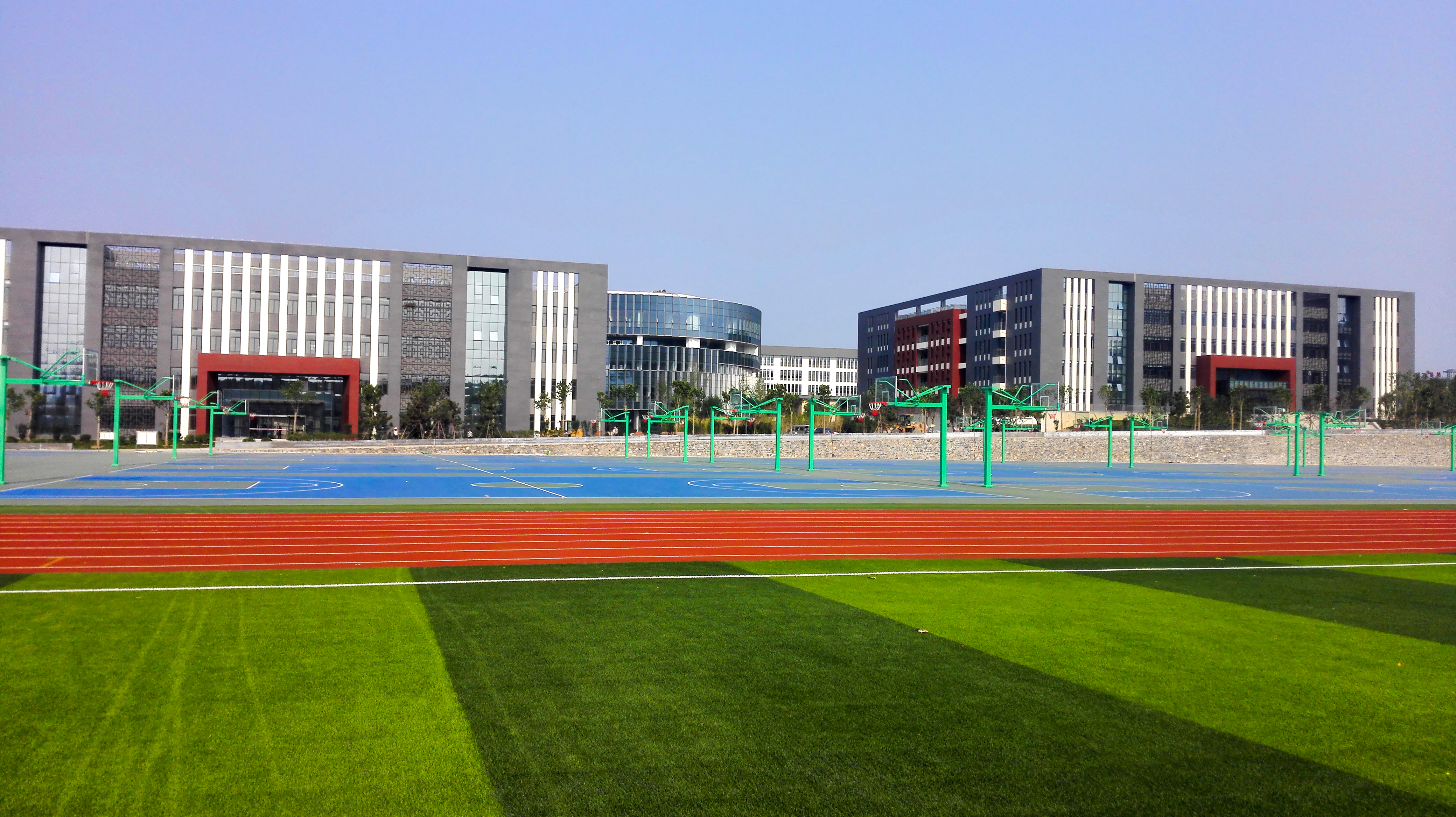 中文（中国大陆）: 这是泰安一中新校区运动场的照片